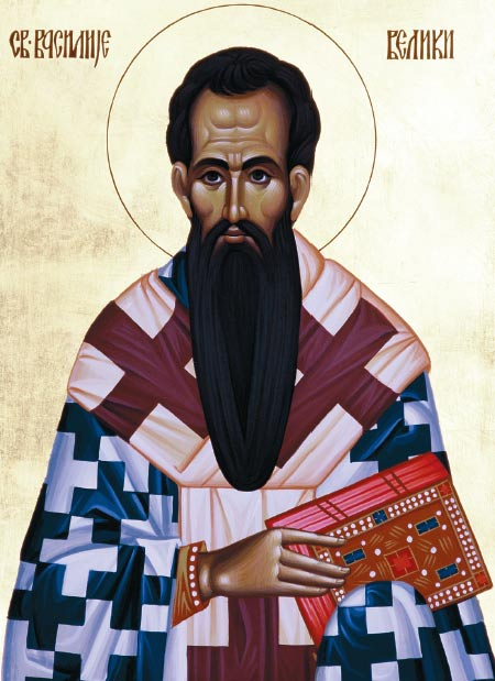 Sveti Vasilije Veliki (ikona).